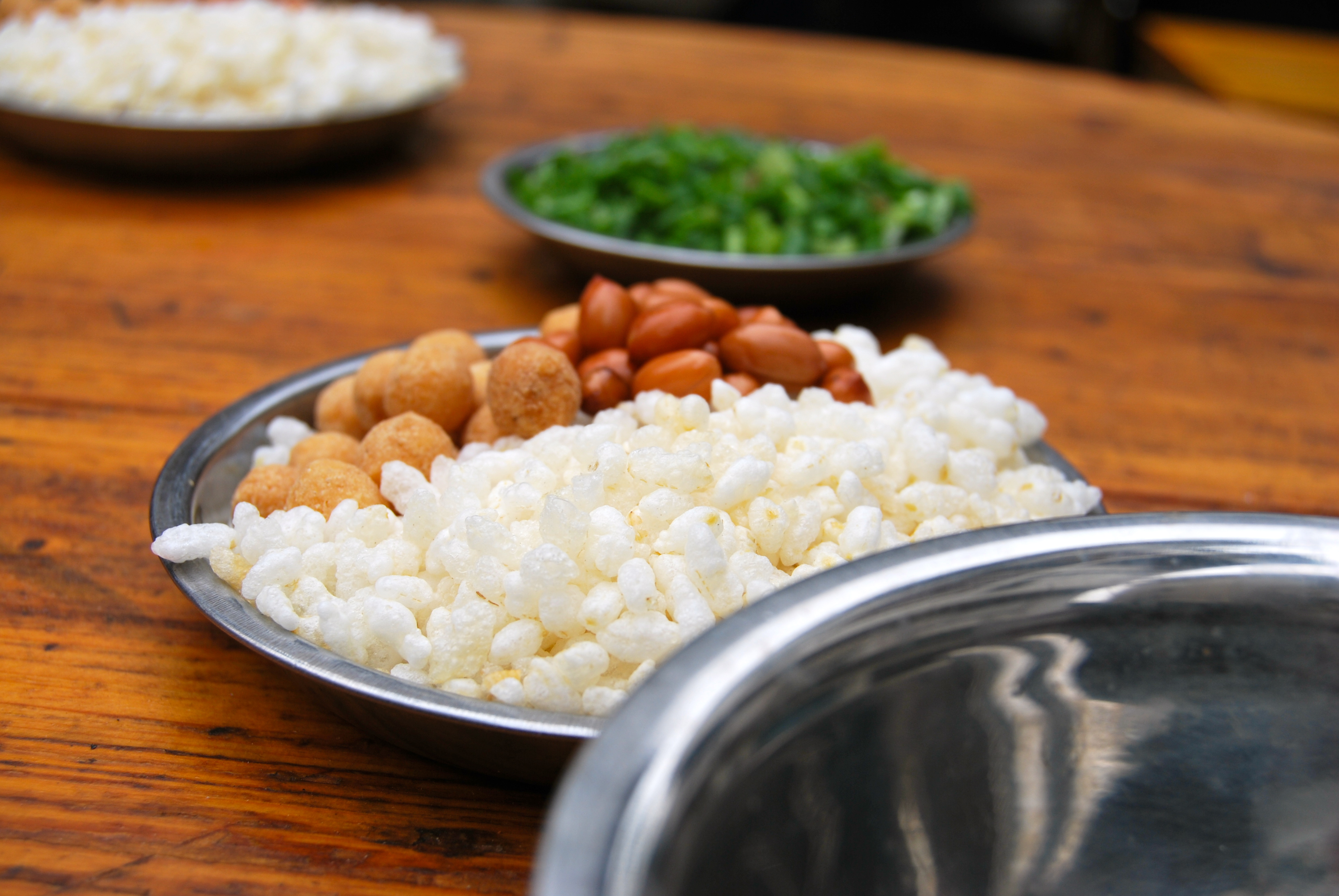 桂林油茶